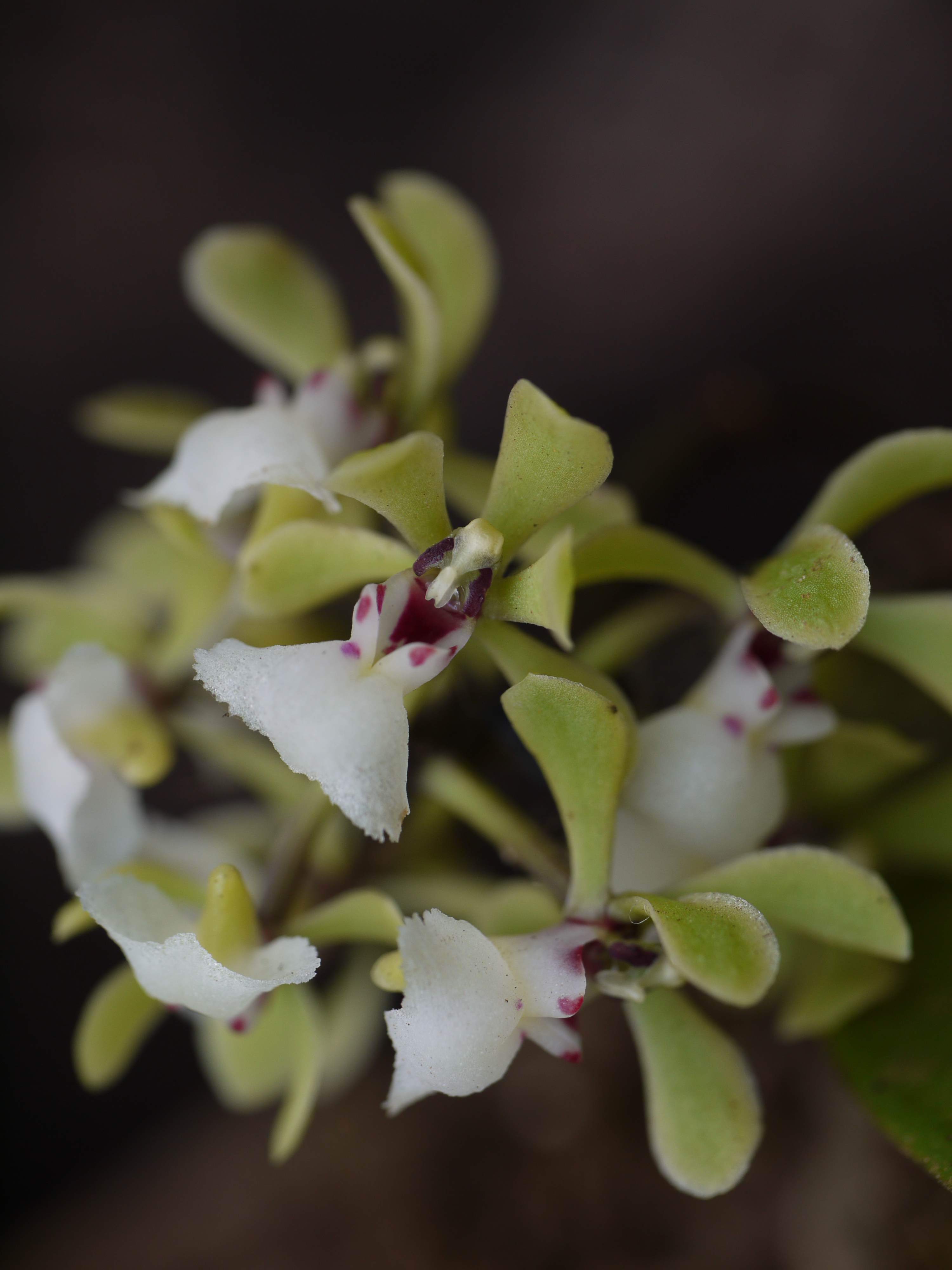 Smithsonia viridiflora (Aerides dalzelliana)